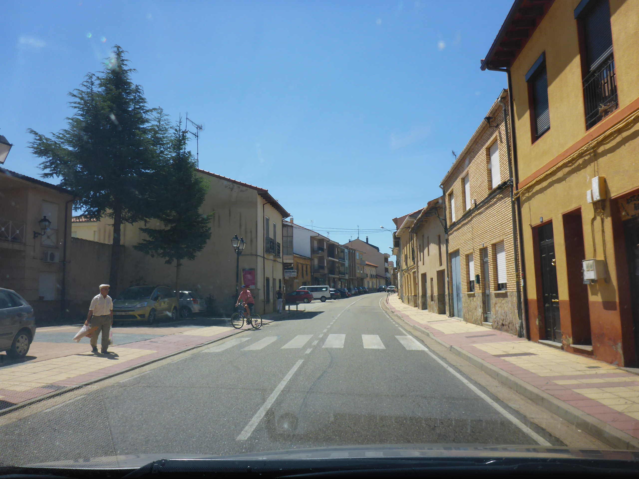 Travesía en Santibáñez de Vidriales